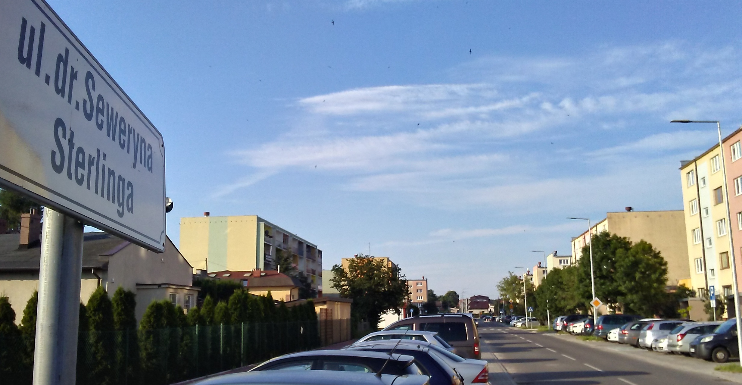 Ulica TOMASZOWSKIEGO lekarza Seweryna Sterlinga w 60-tysięcznym Tomaszowie Mazowieckim, w województwie łódzkim